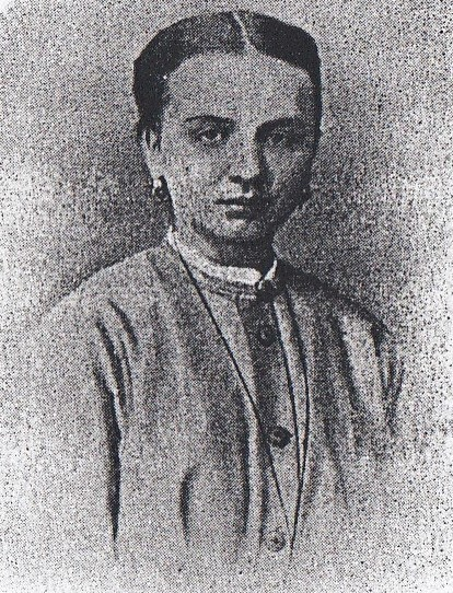 Die junge Pauline Herber